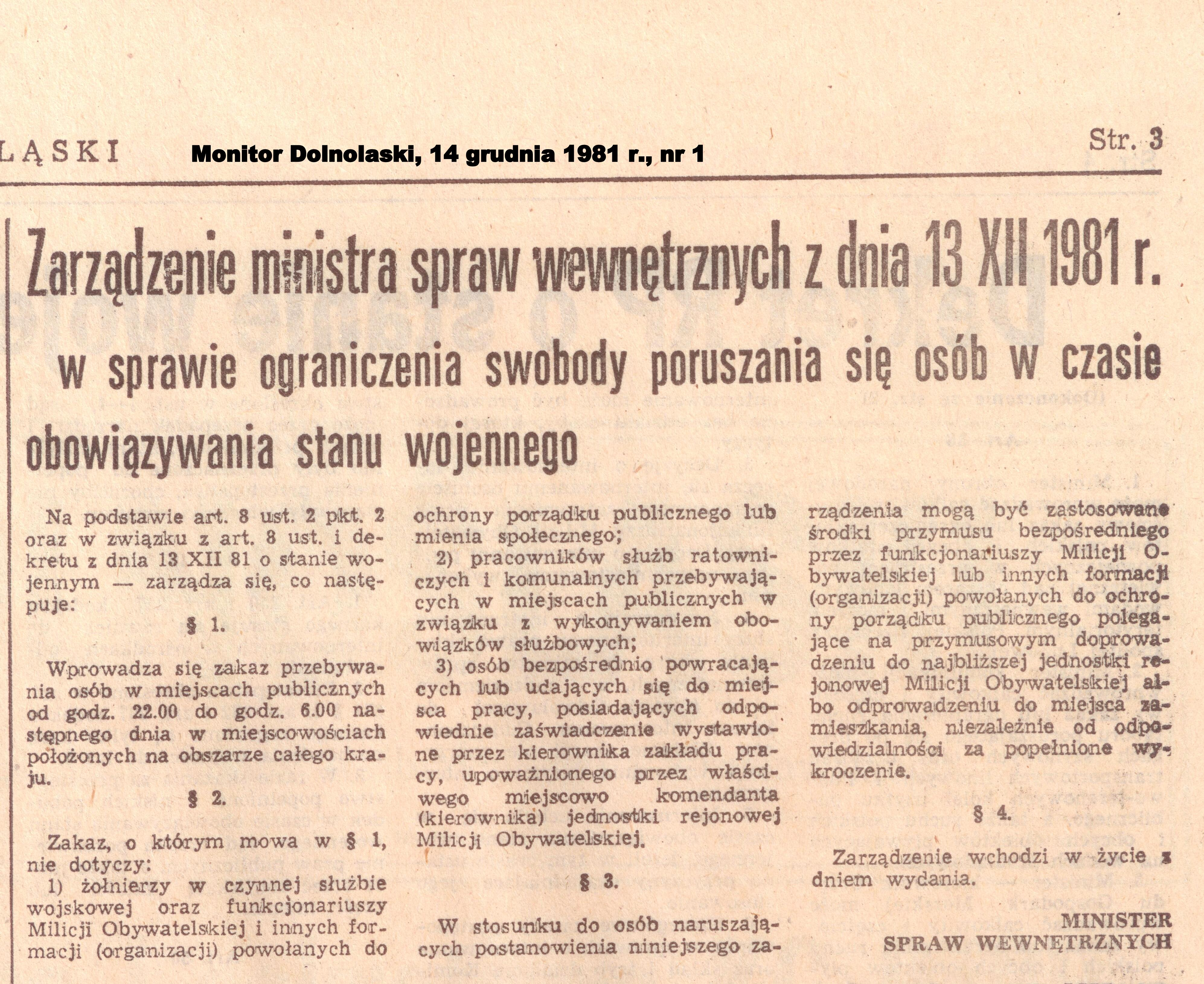 Stan wojenny, zarządzenie ministra spraw wewnętrznych z 13.12.1981 r. -Monitor Dolnośląski 14 grudnia 1981 r., nr 1